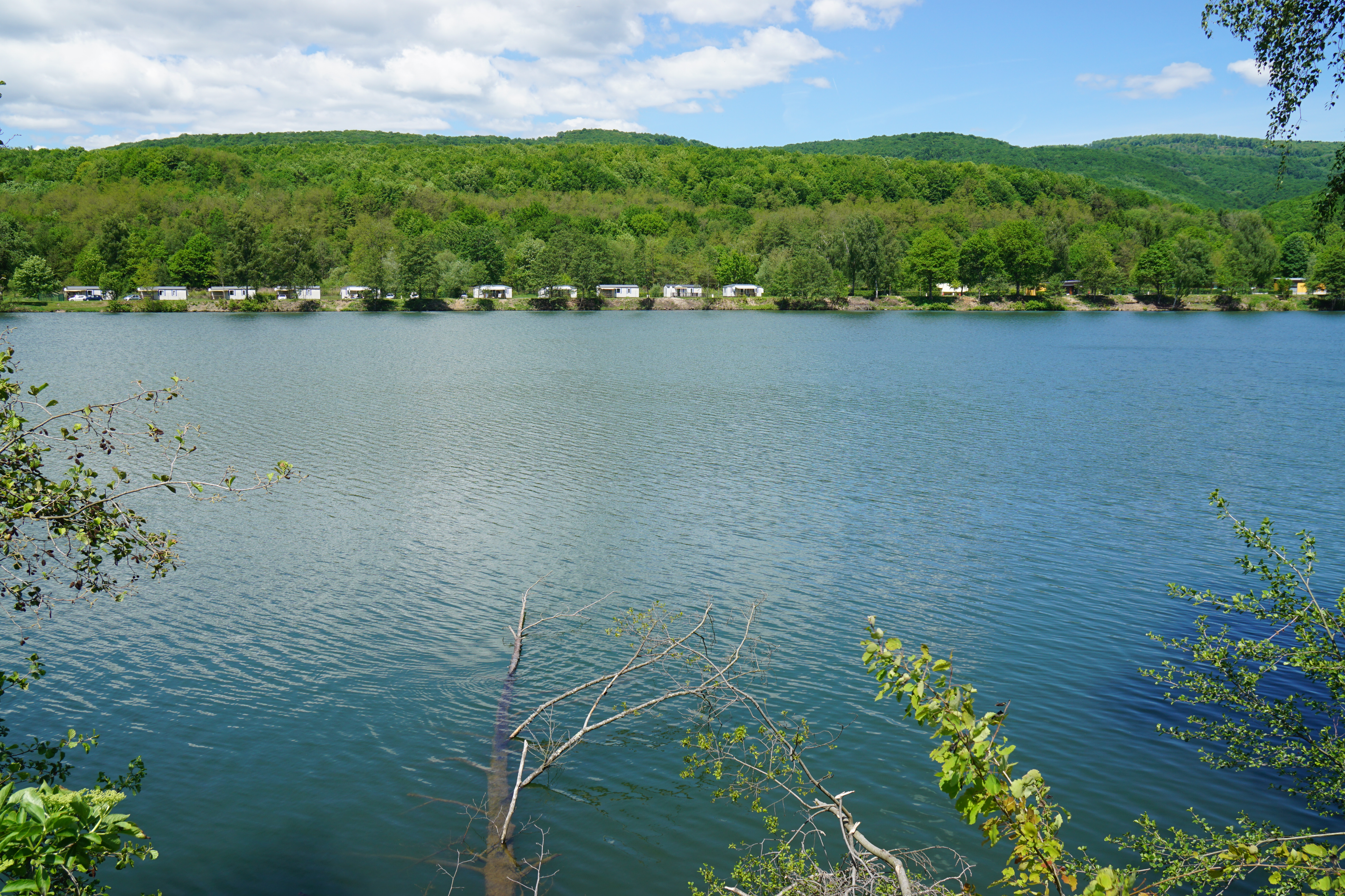 Les ballastières et le camping de Champagney (Haute-Saône).